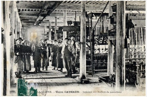 L'usine textile Cathaud, installée dans l'ancienne abbaye de la Sauve-Bénite au dix-neuvième siècle